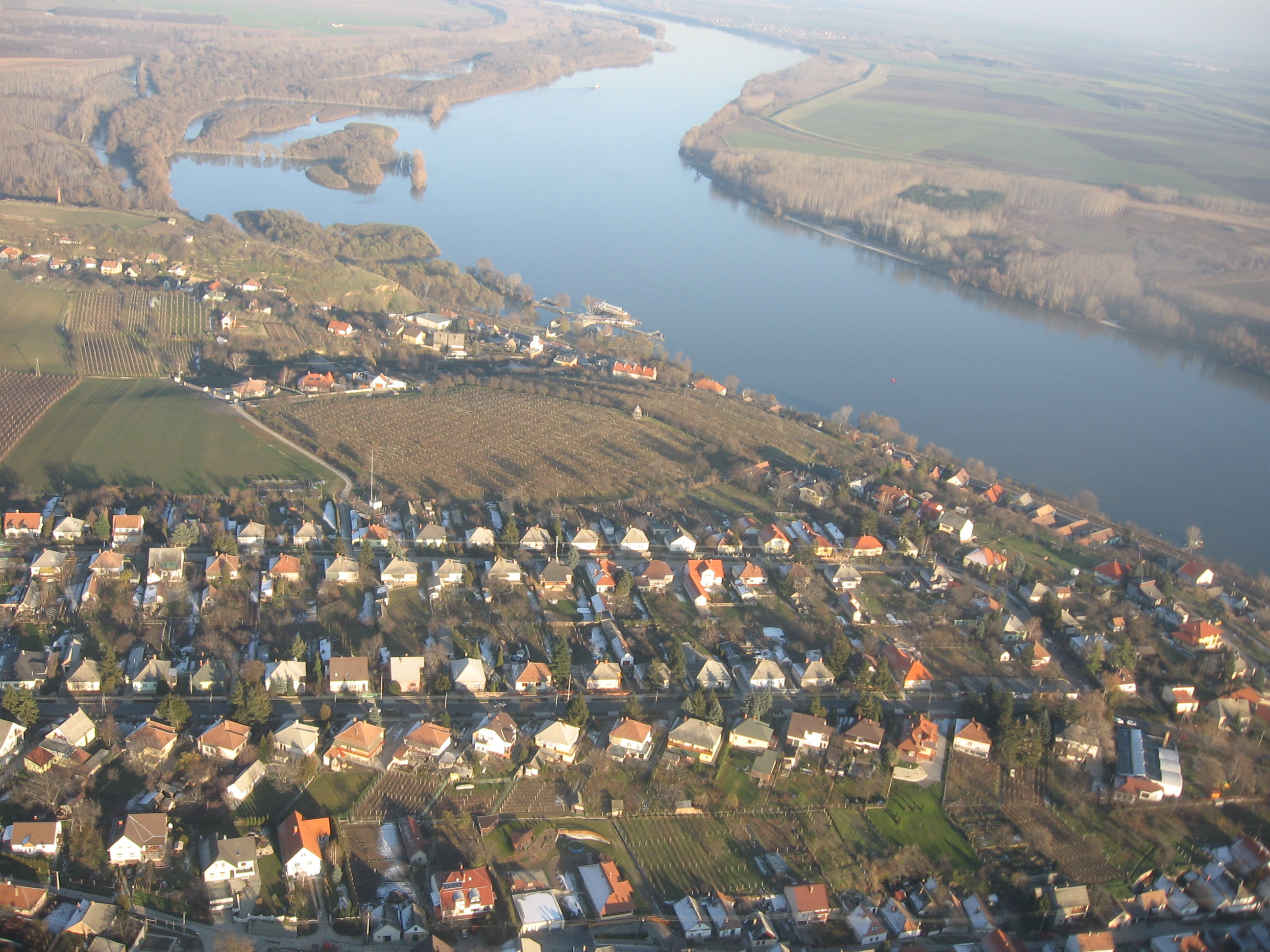 Légifelvétel Paks felett, észak-keleti irányba, a Dunával